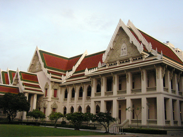 MahaChulalongkorn Building